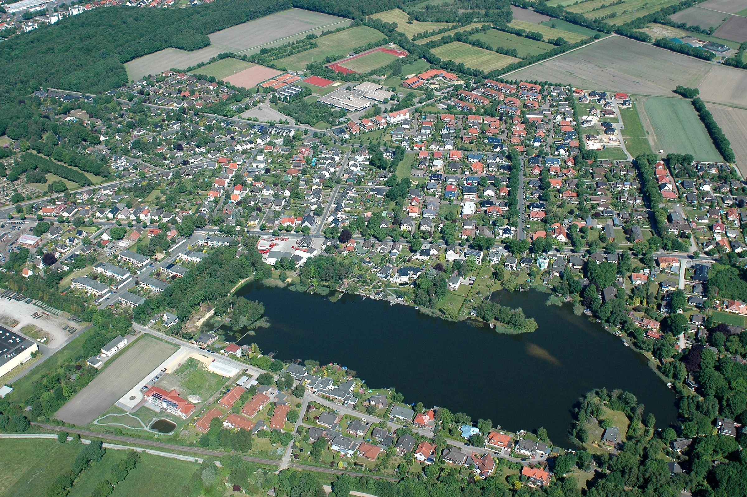 Baggerkuhle 1, Langen Fotoflug vom Flugplatz Nordholz-Spieka über Cuxhaven und Wilhelmshaven